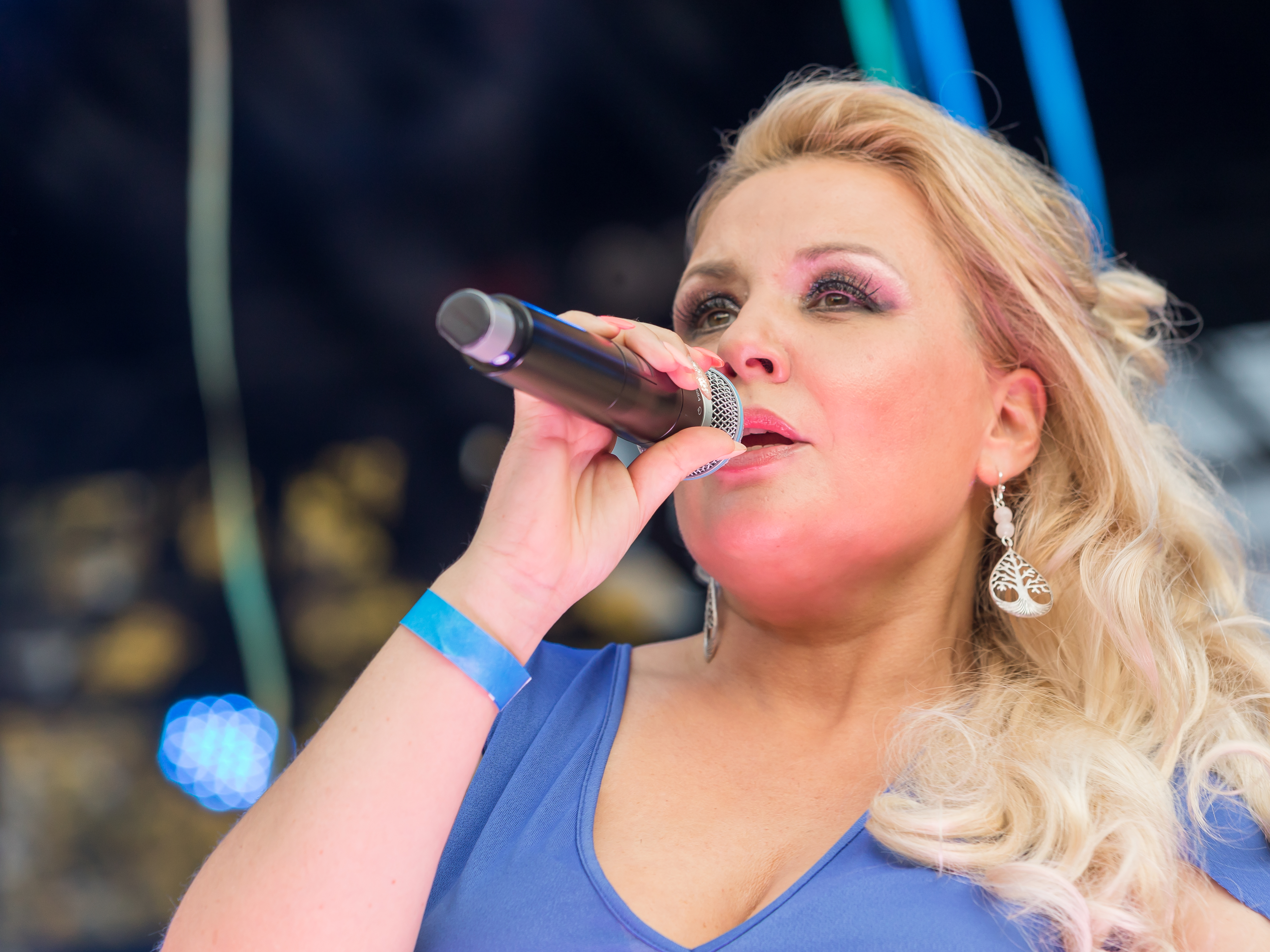 ColognePride/CSD 2018 - Auftritt von Damae auf der Hauptbühne, Heumarkt